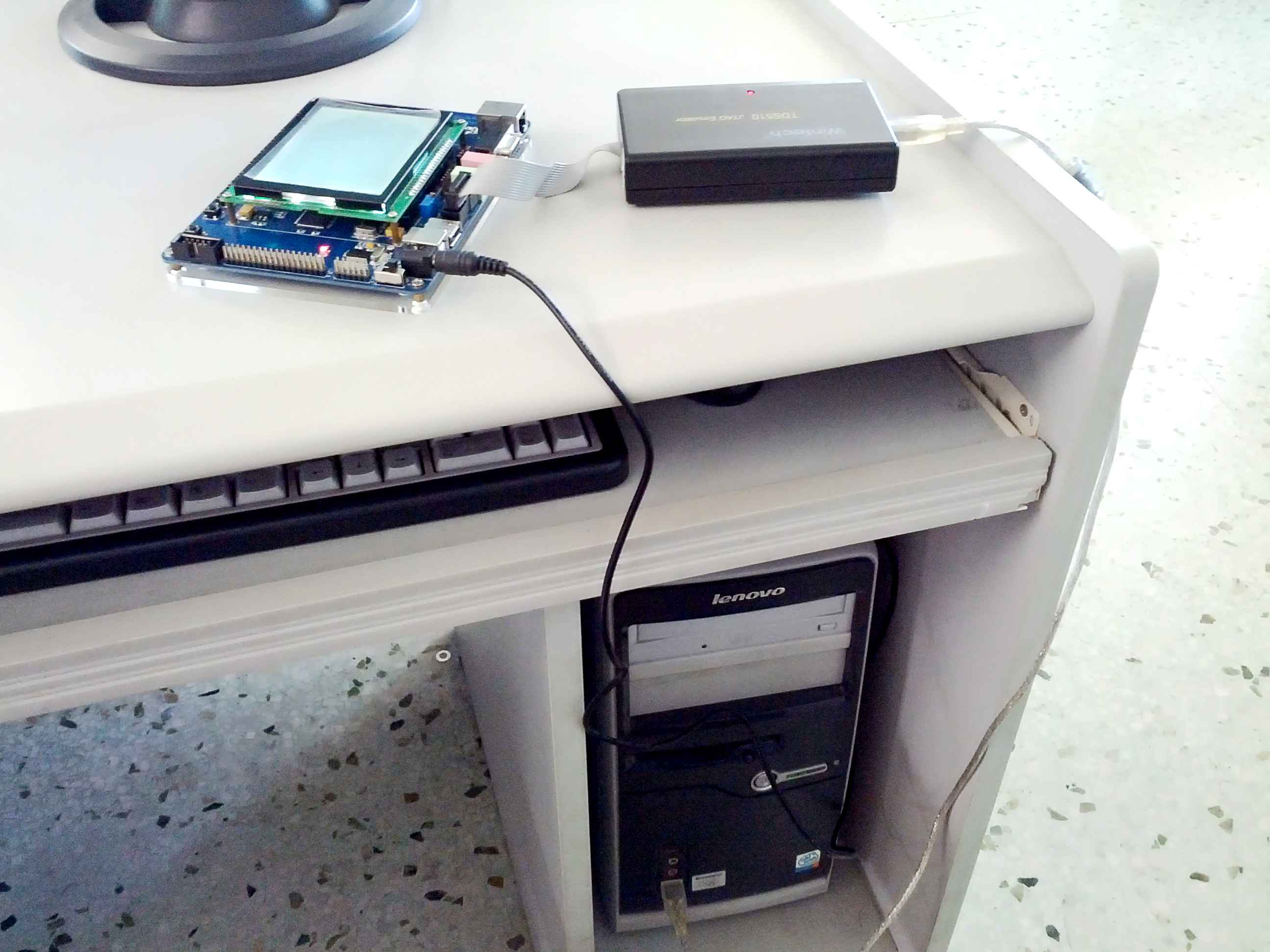 中文（中国大陆）: 一块与PC机相连接的DSP板